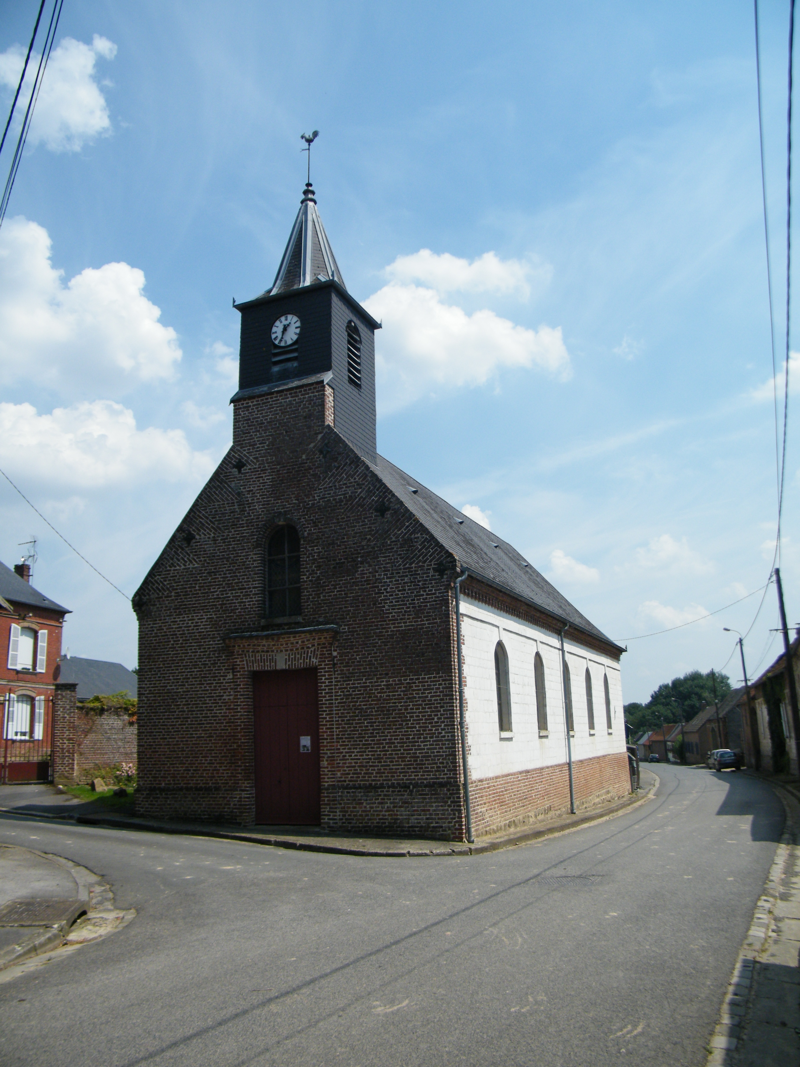 église.